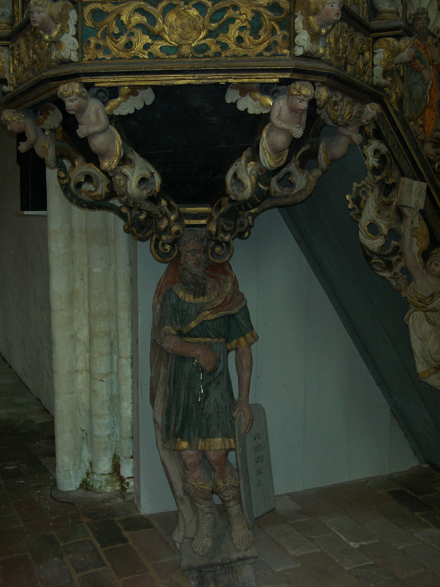 Eine Mosesfigur trägt die Kanzel; Kirche in Groß Mohrdorf